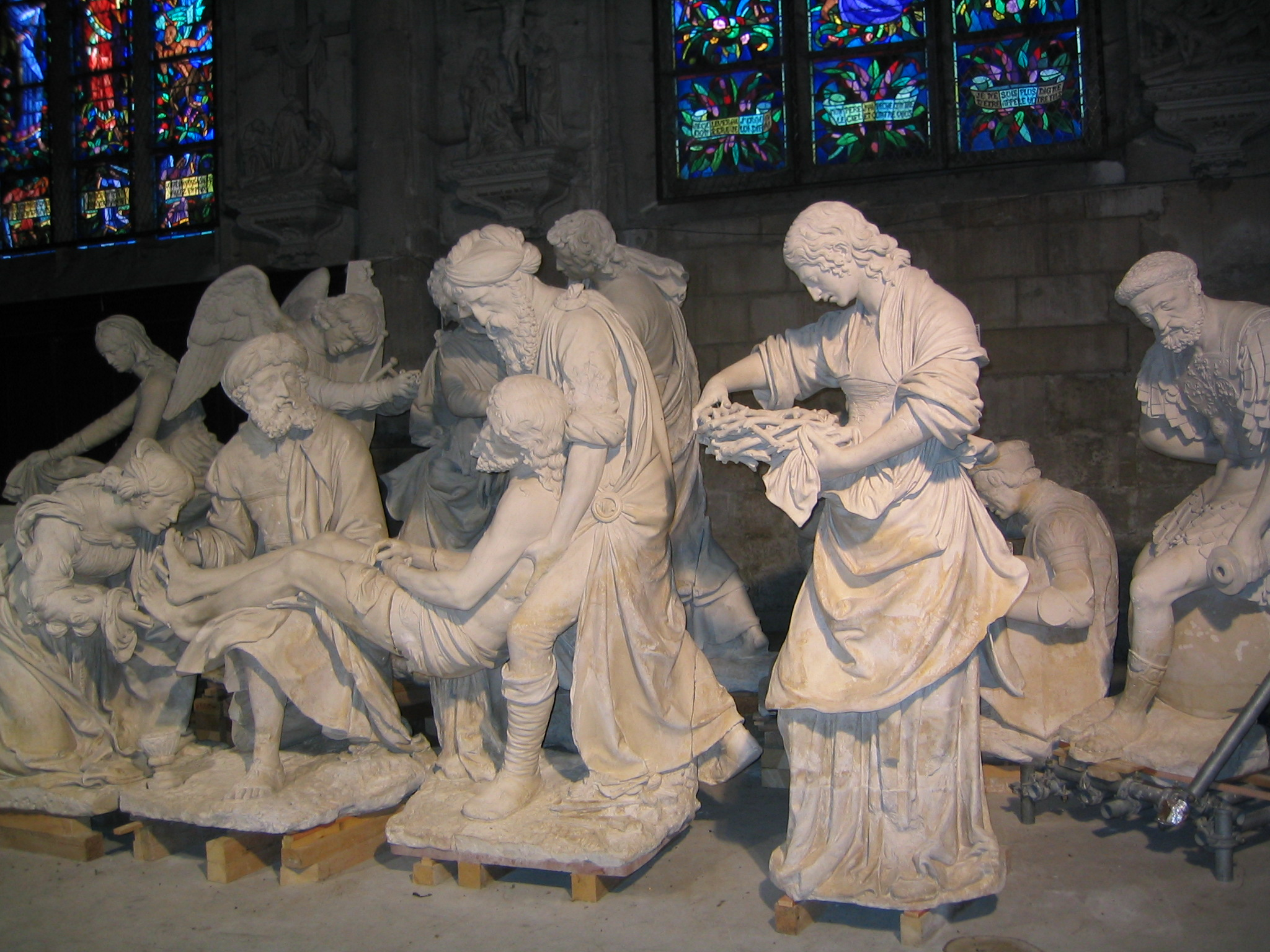 Author = Ligier Richier (Saint-Mihiel, 1500 ca - Geneva, 1566) Title = Lamentation of Christ Location = Eglise Saint-Etienne, Saint-Mihiel, département de la Meuse, France